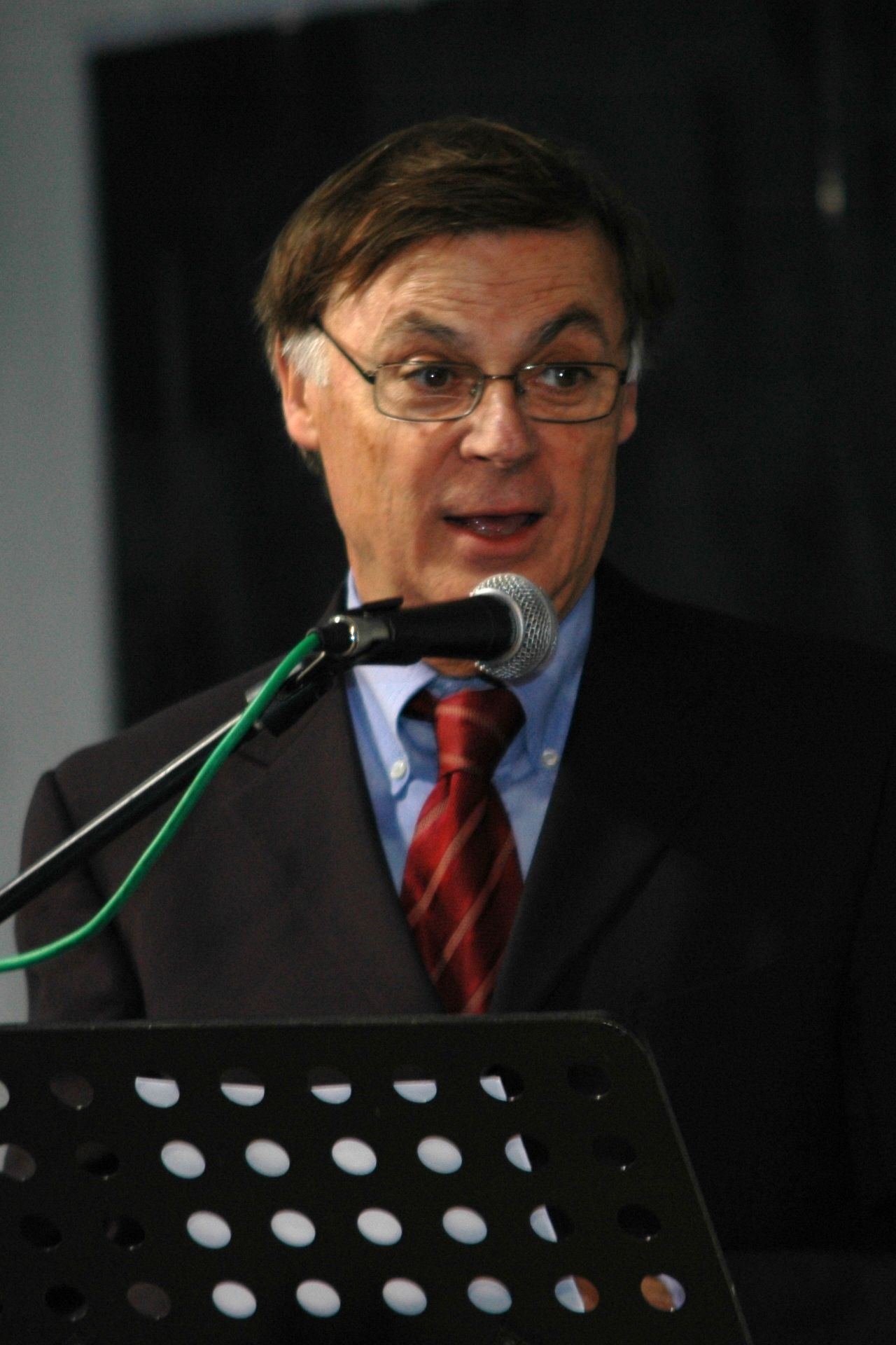 Carles Solà i Ferrando